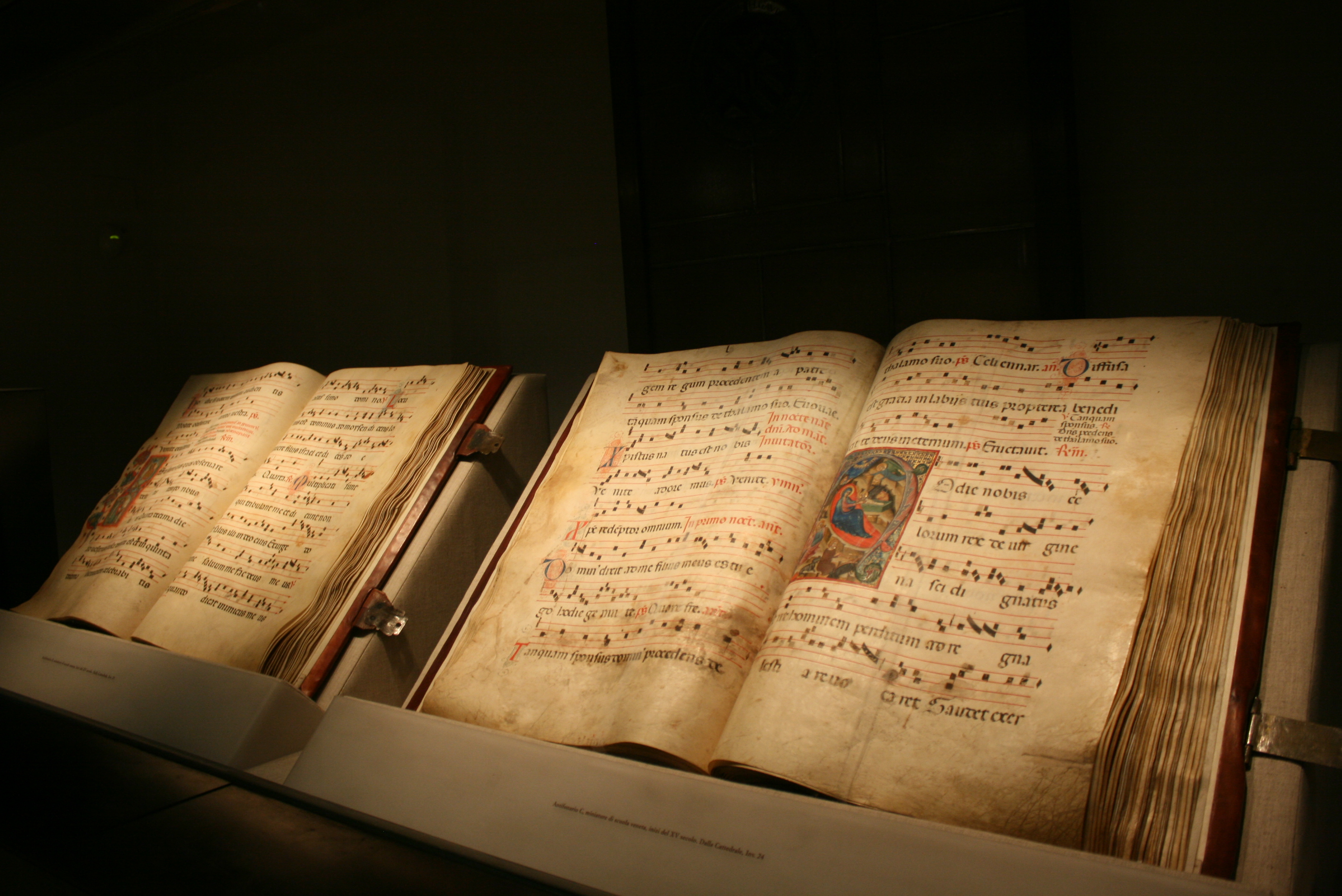 Due antifonari parte della collezione di codici miniati del Museo Diocesano Tridentino